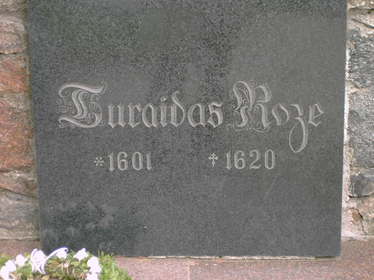 Turaidas Rose